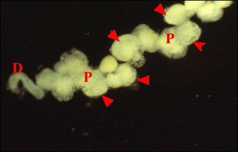 Glande agrégée botrioïde de Kaira isolée